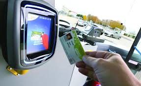 Carabus-billetik